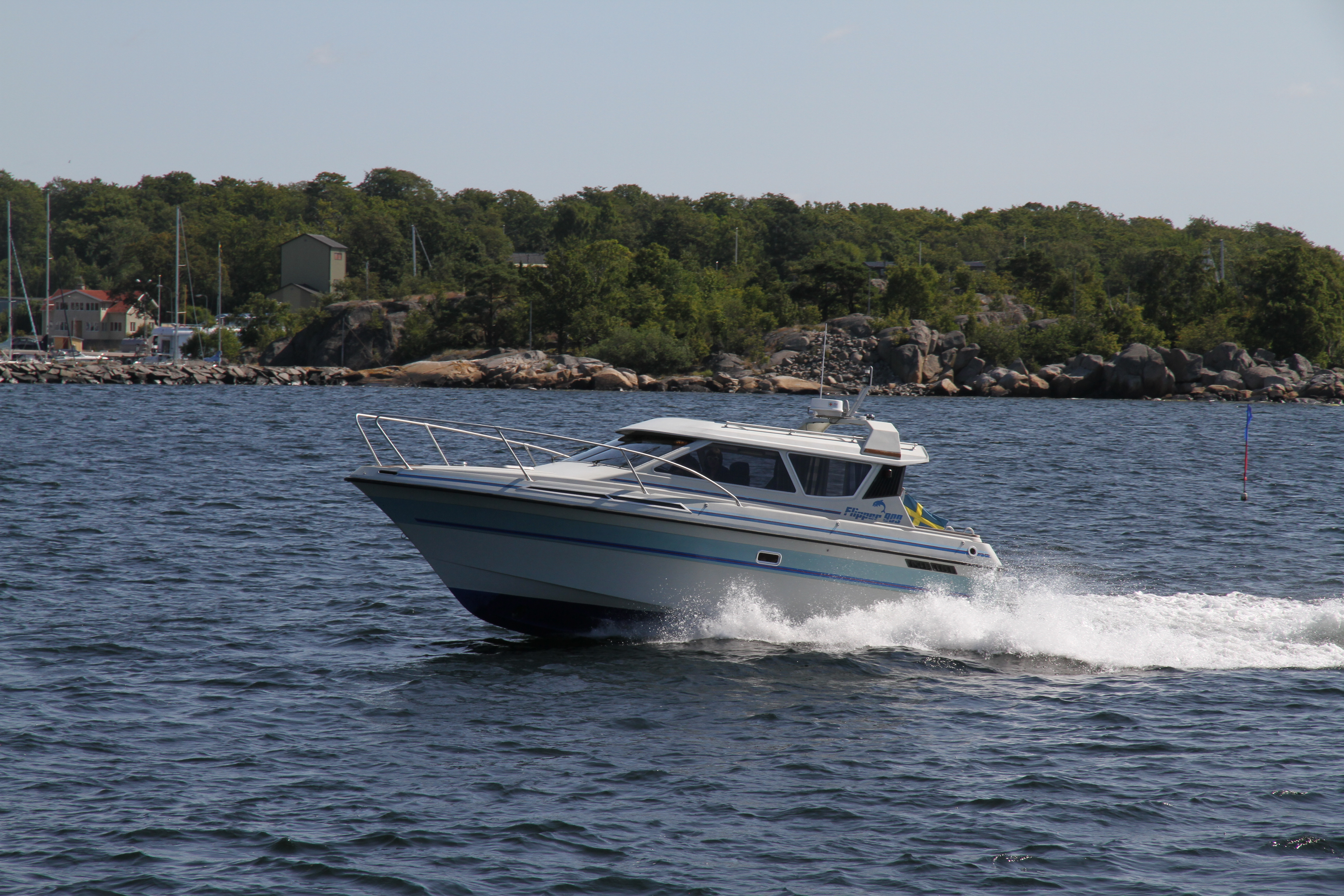 Flipper 909 utanför Karlshamn 16 juli 2015